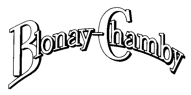 Ursprünglicher Schriftzug (Logo) der Museumsbahn Blonay–Chamby (BC)